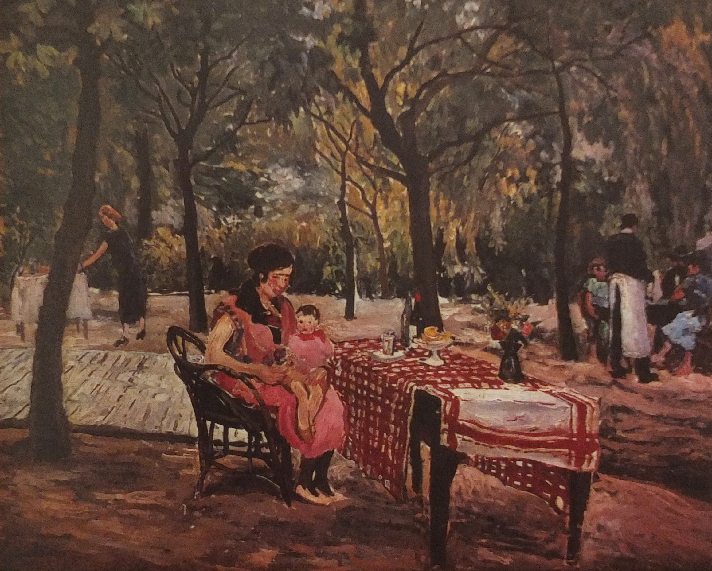 Terrasse - Jardin du moulin de la Galettetitle QS:P1476,fr:"Terrasse - Jardin du moulin de la Galette" label QS:Lfr,"Terrasse - Jardin du moulin de la Galette"